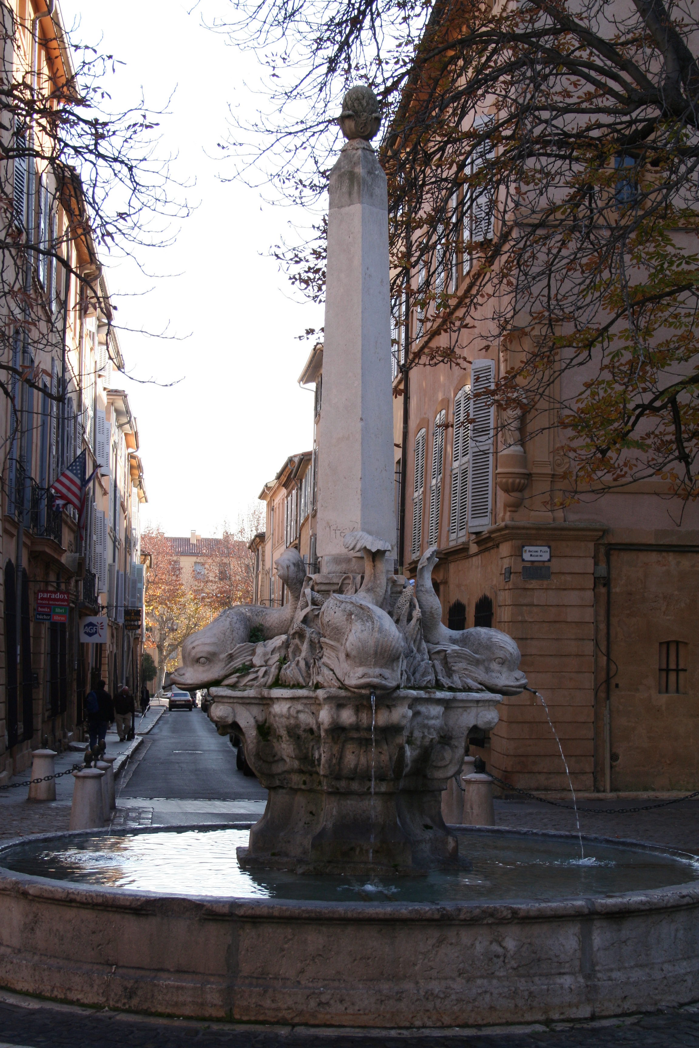 Fontaine des Quatre-Dauphins, Aix-en-Provence (France).